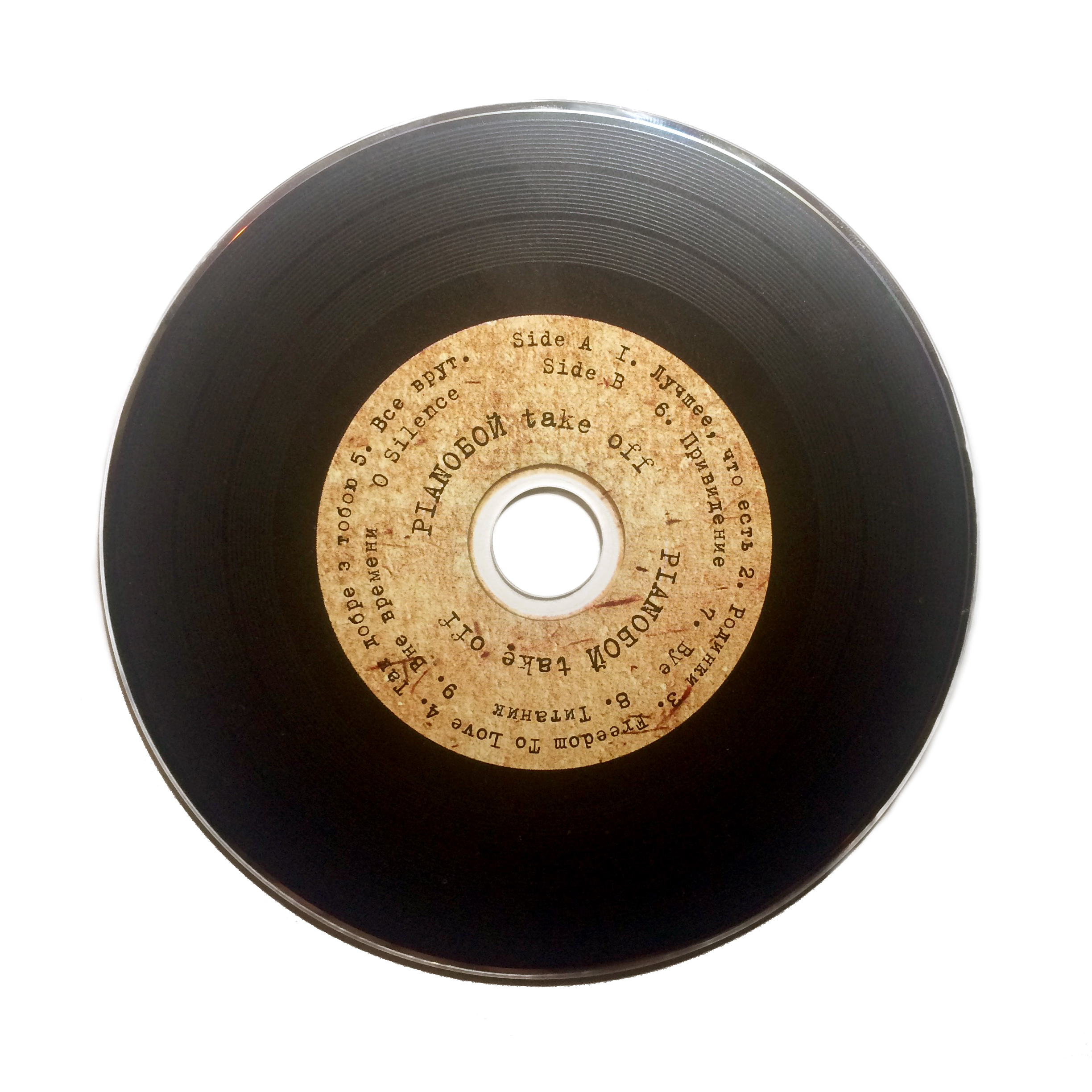 Вигляд CD-альбому Take Off гурту Pianoбой